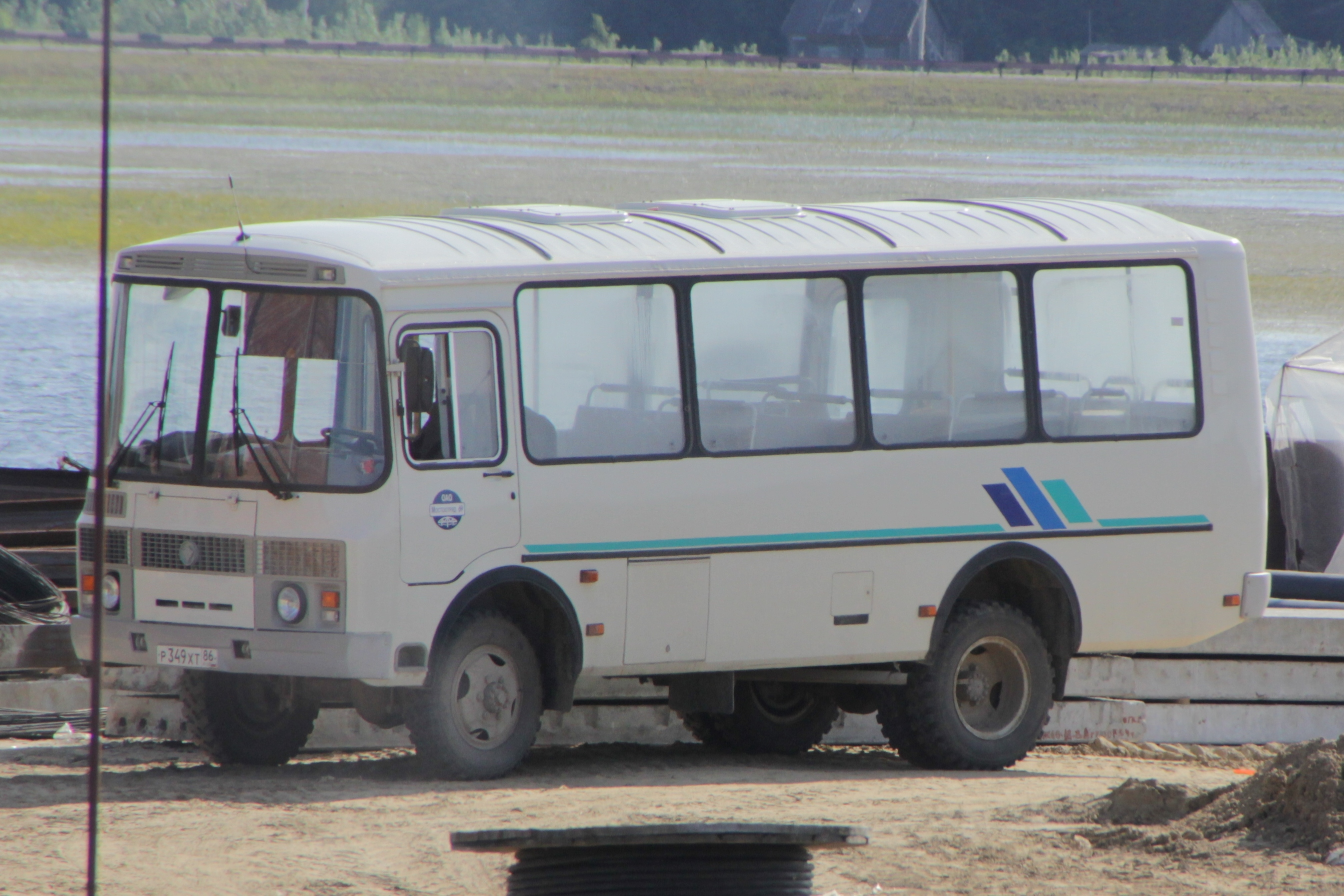 Ein PAZ-3206 (Allradvariante des PAZ-3205) auf einer Baustelle im Hafen von Berjosowo, Sibirien.